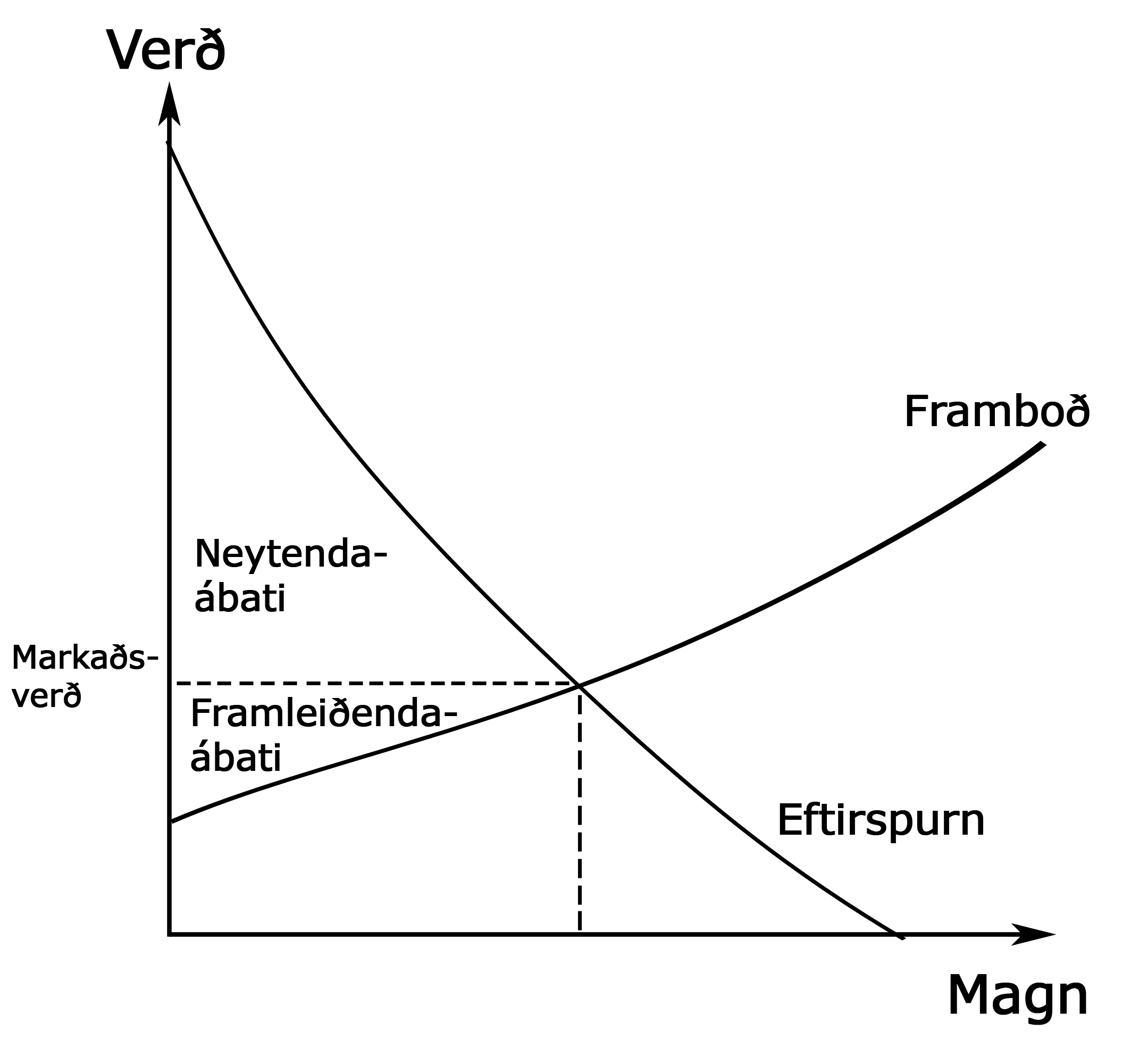 Samspil framboðs og eftirspurnar. Neytenda- og framleiðendaábati